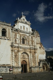 == Licenza d'uso ==